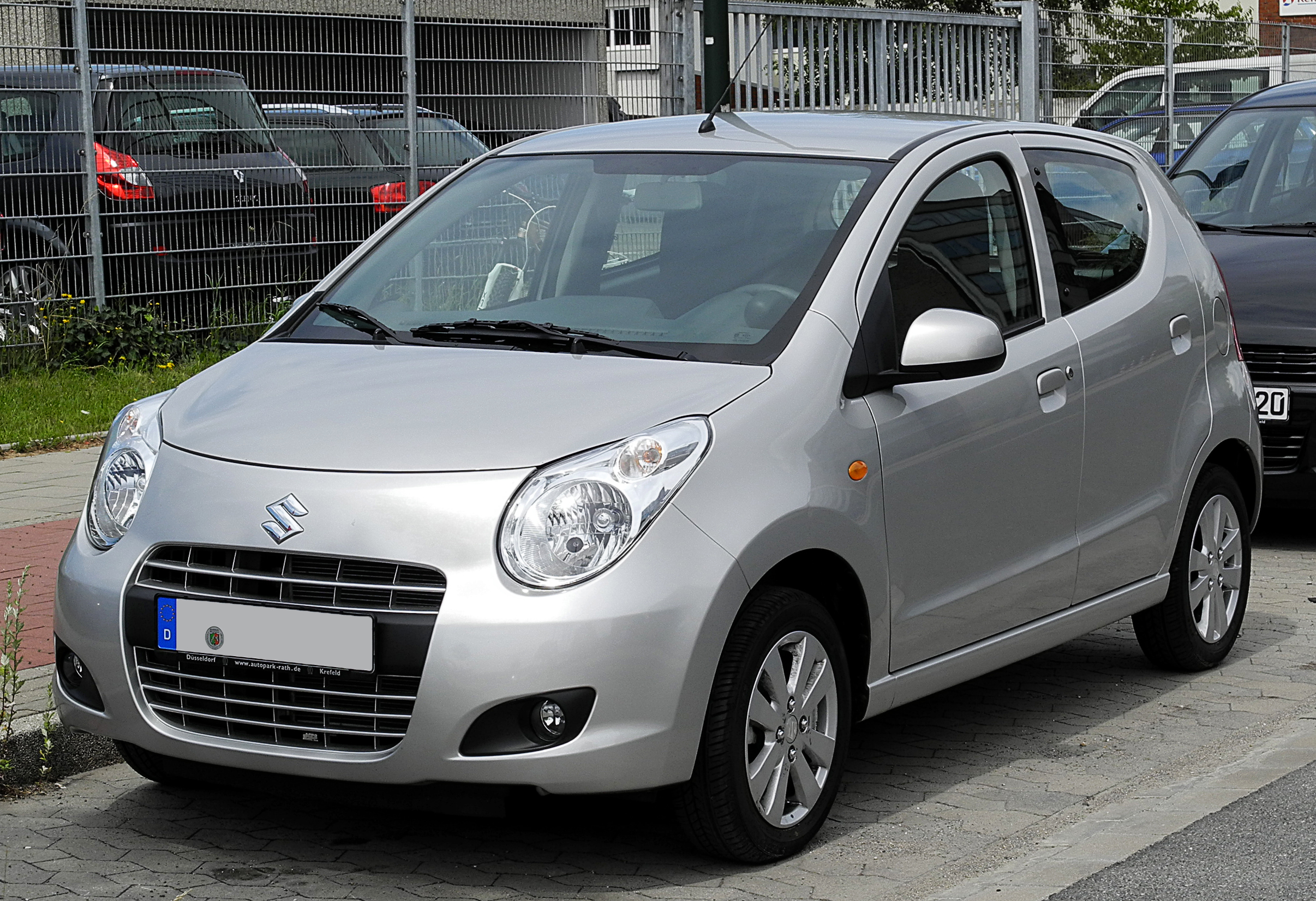 Suzuki Alto 1.0 Comfort (VII)